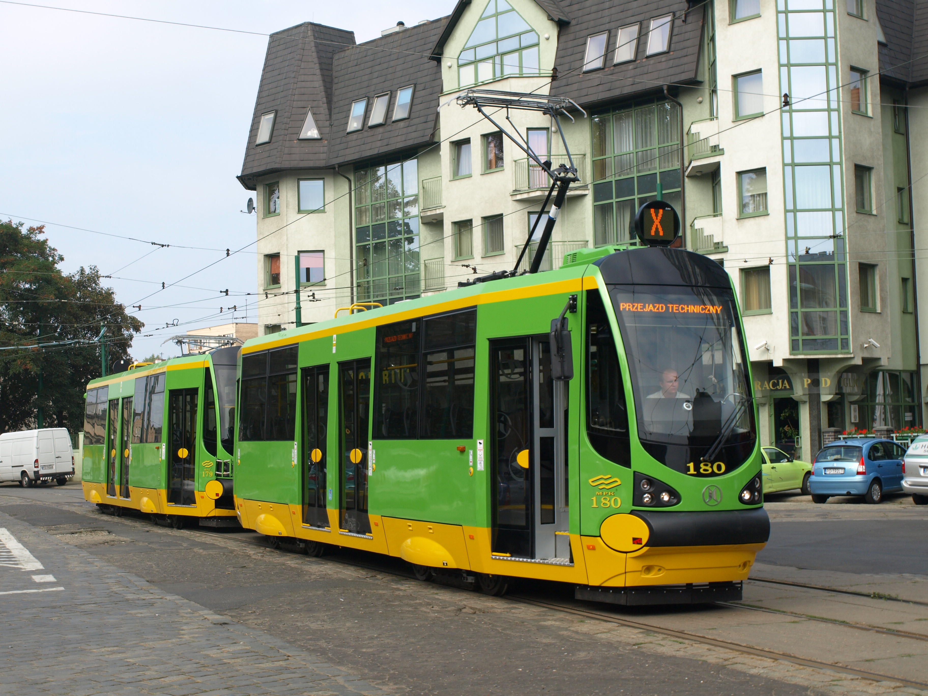 Moderus Alfa 180+179. Poznań, ul. Zwierzyniecka.